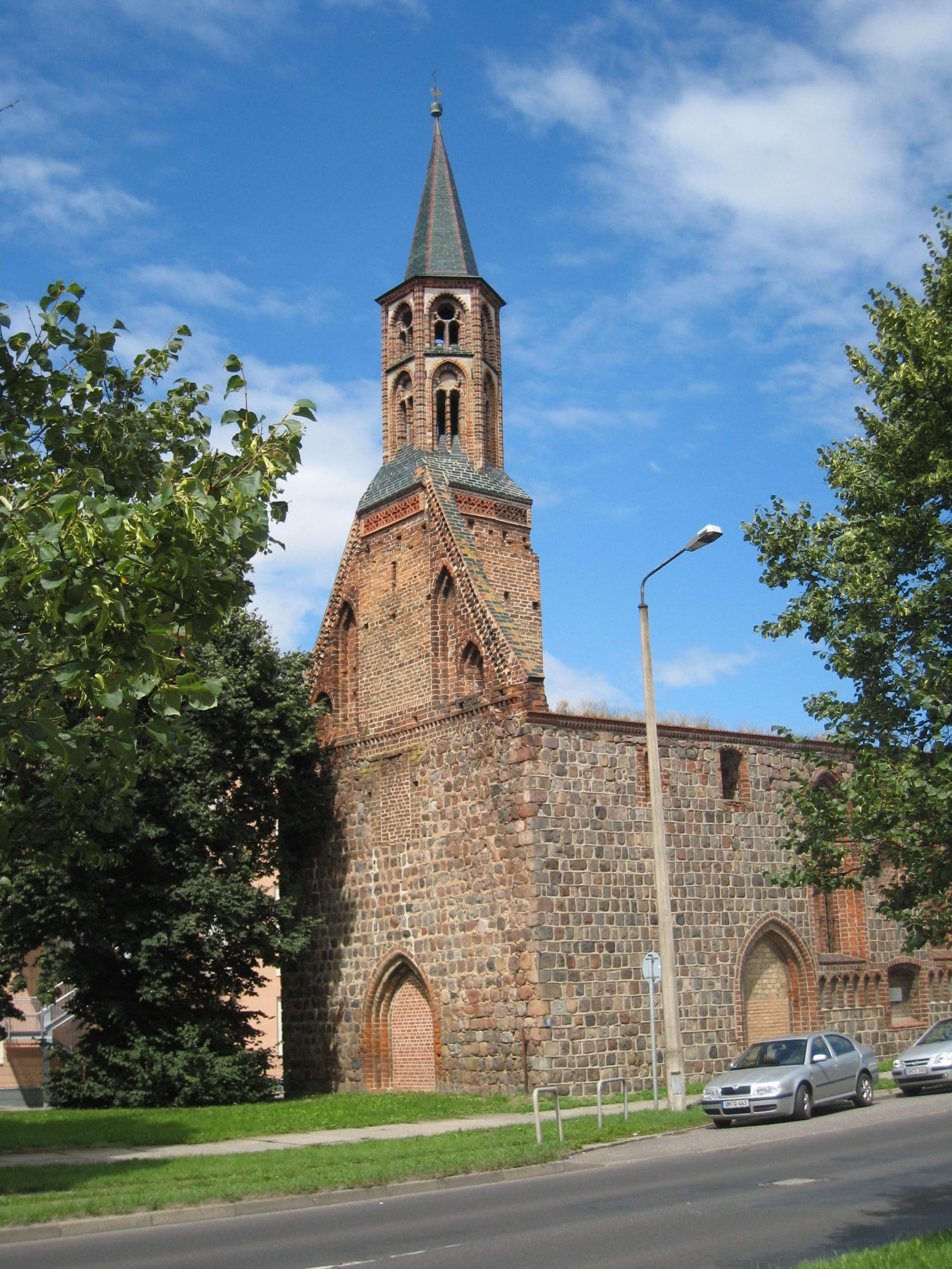 Ruine der Heiliggeistkirche Prenzlau